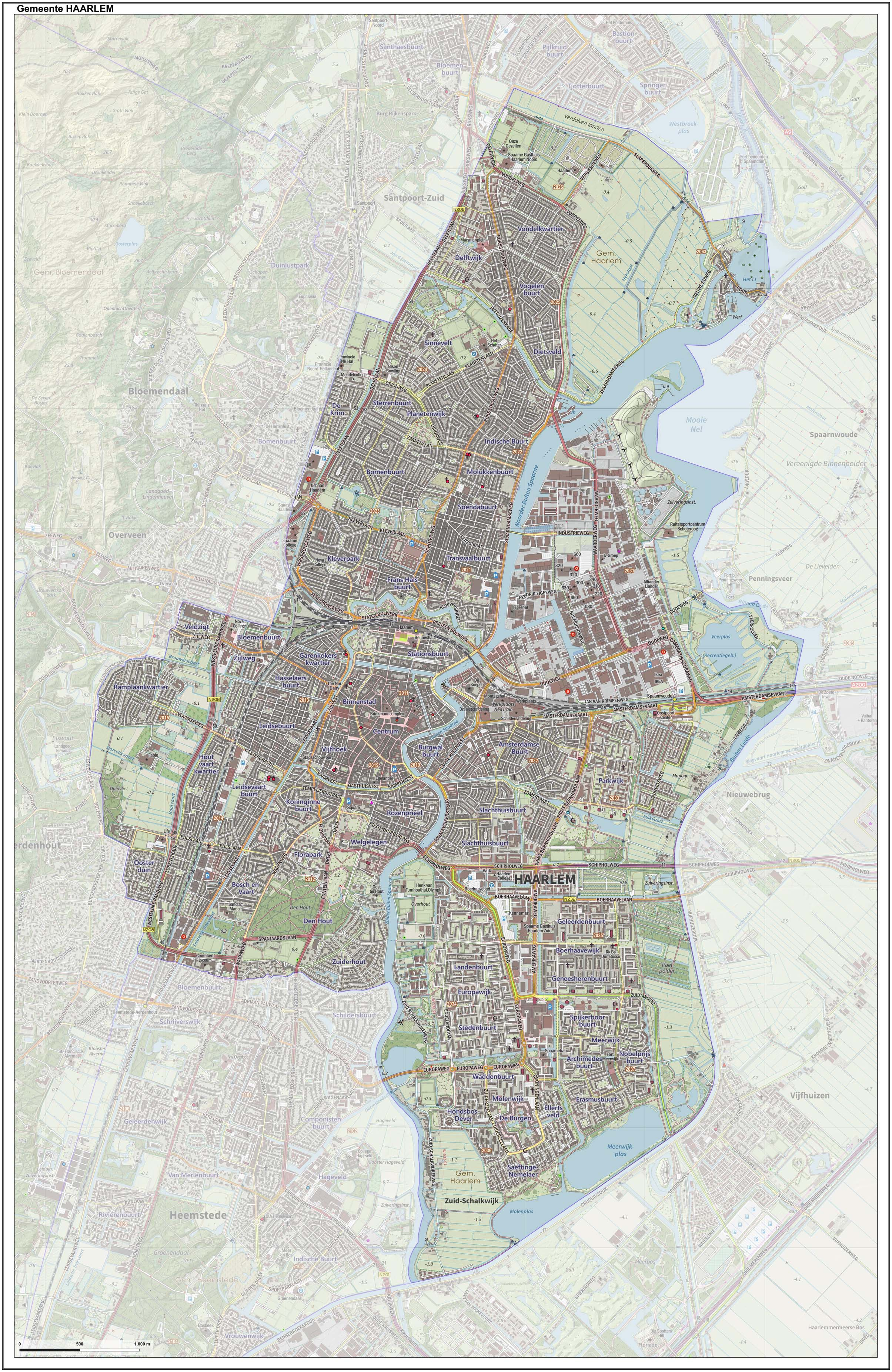 Topografische gemeentekaart. Resolutie: 400 pixels/km. Kaartbeeld samengesteld uit de open geodata van de Top10NL en Top25namen (Kadaster), Creative Commons-BY licentie. Gebouwvlakken uit open geodata BAG extract. Wegen uit de OpenStreetMap, OpenStreetMap community. Reliëfschaduw uit de Actuele Hoogtekaart AHN2. Samenstelling en kleurenschema: Jan-Willem van Aalst, met QGIS. Zie ook de Legenda.